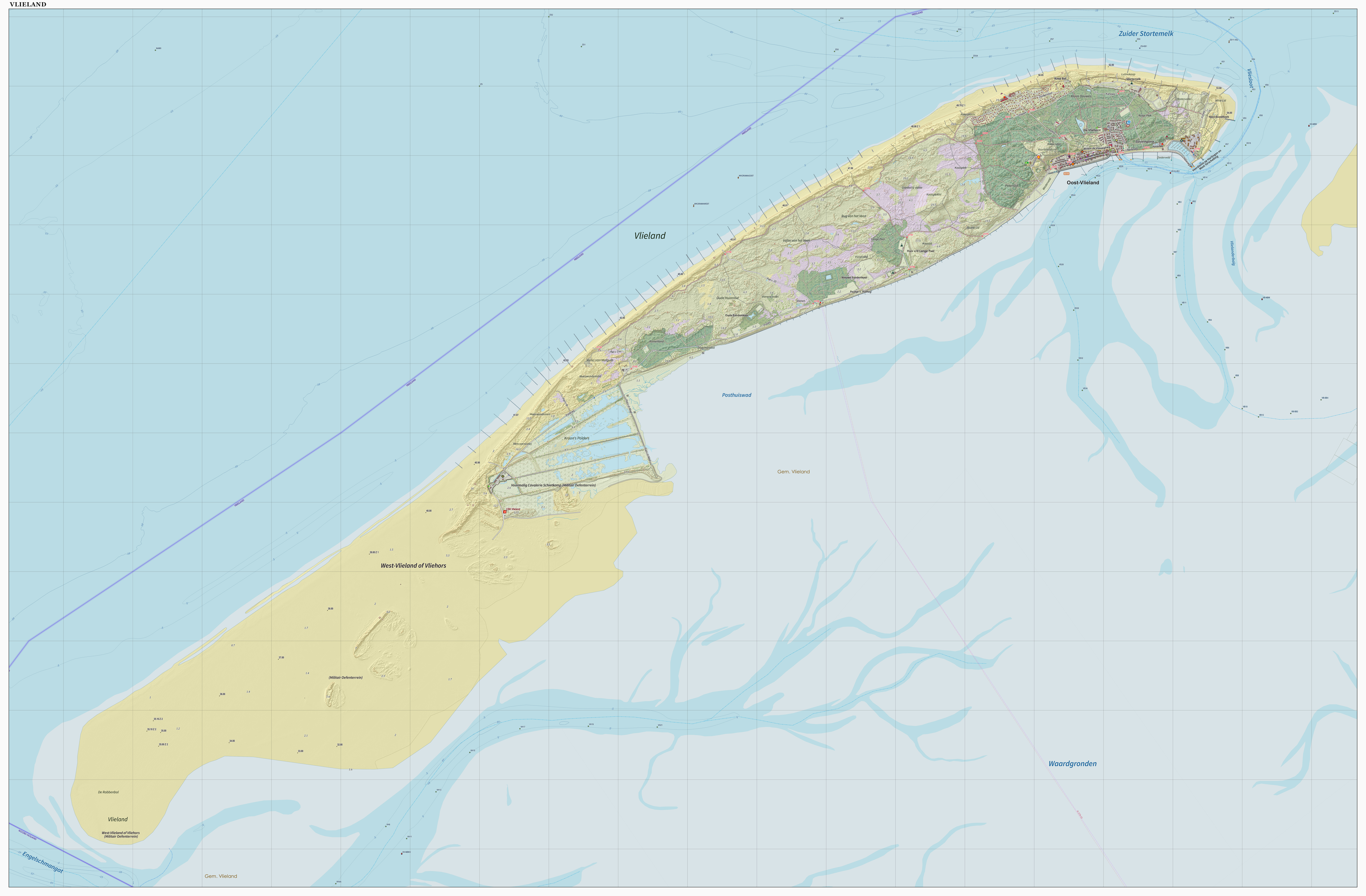 Topografische kaart van Vlieland (natuurgebied). Resolutie: 400 pixels/km. Samengesteld door Jan-Willem van Aalst op basis van de GML open geodata van de BRT/Top10NL (basisregistratie Topografie, Kadaster), vrijgegeven door Kadaster onder de Creative Commons BY licentie. Additionele gegevens uit BAG uit de Open Street Map en uit de Risicokaart. Zie ook de Legenda.